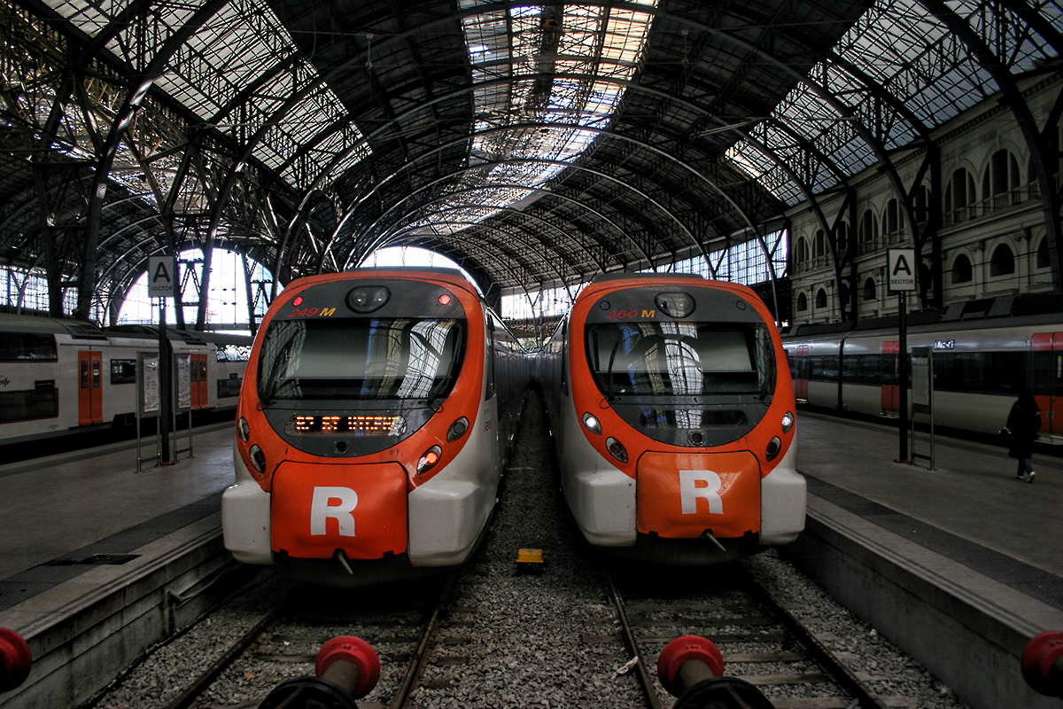 Renfe Rodalies Catalunya Serie 465 Civia (249M + 260M) - Estació de França